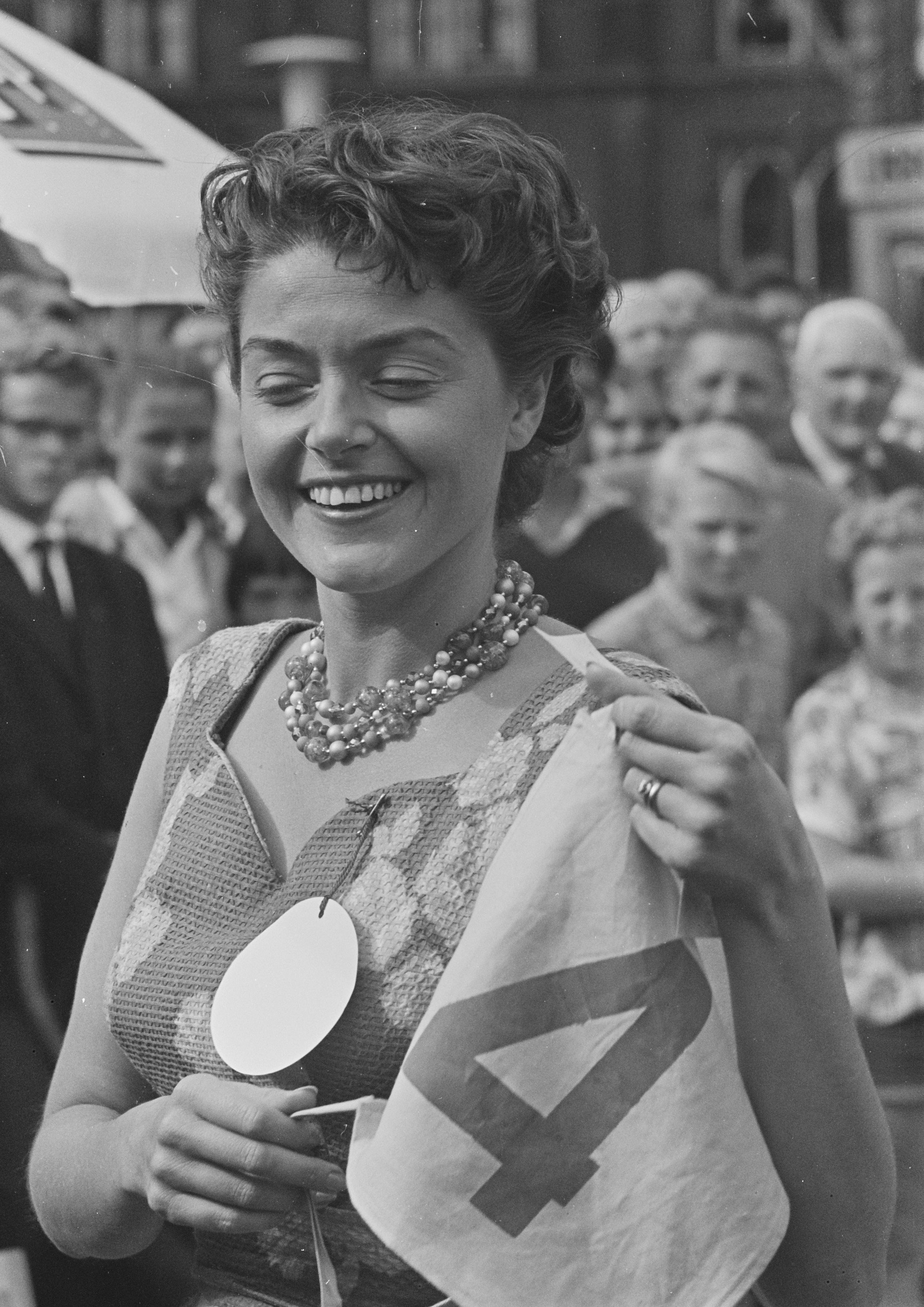 Collectie / Archief : Fotocollectie Anefo Reportage / Serie : [ onbekend ] Beschrijving : Dam tot Dam race , Teddy Scholten in aktie Datum : 27 augustus 1959 Locatie : Amsterdam, Noord-Holland Trefwoorden : evenementen, zangeressen Persoonsnaam : Scholten, Teddy Fotograaf : Pot, Harry / Anefo Auteursrechthebbende : Nationaal Archief Materiaalsoort : Negatief (zwart/wit) Nummer archiefinventaris : bekijk toegang 2.24.01.05 Bestanddeelnummer : 910-6304